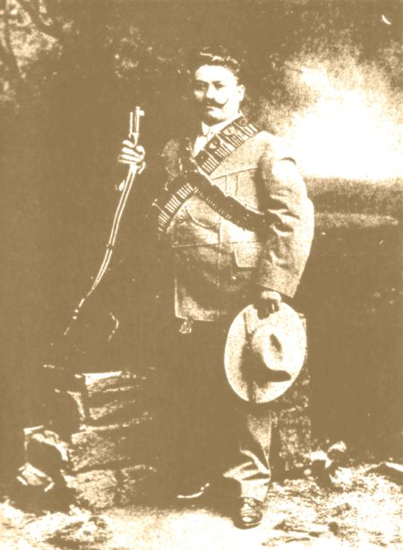 Der zapatistische General Otilio Montaño